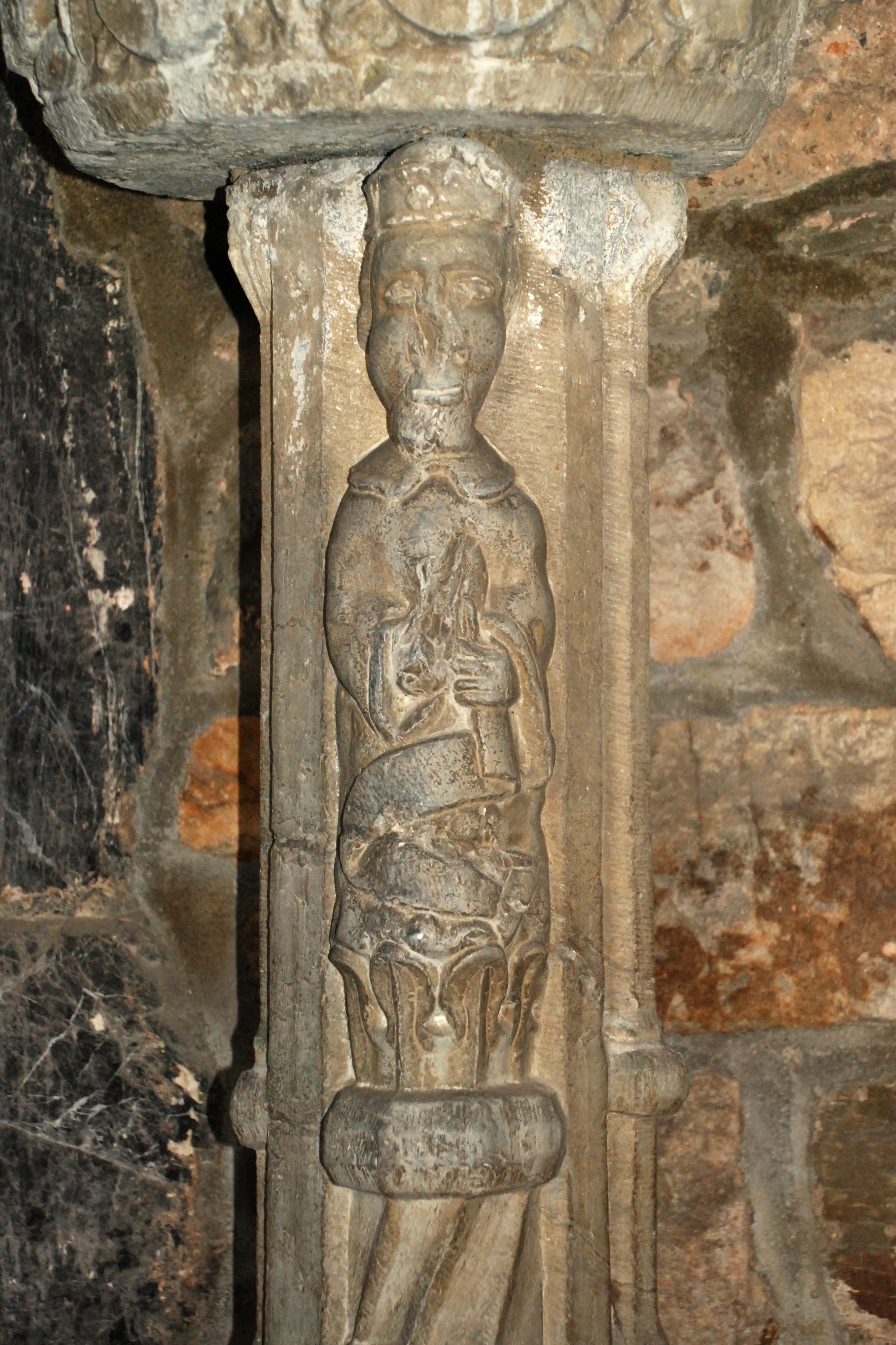 Belgique - Wallonie - Église Saints-Hermès-et-Alexandre de Theux